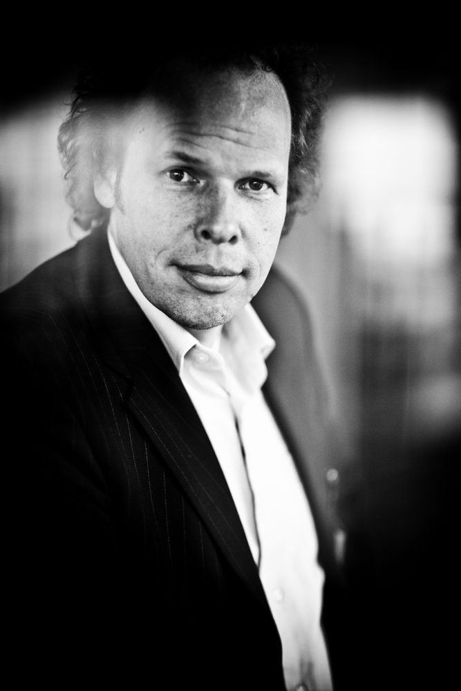 Maarten de Bruijn @ Auto(r) 2010, Photo: Laurent Nivalle